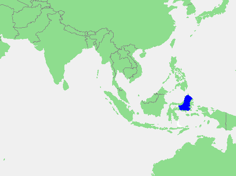 Molukse Zee